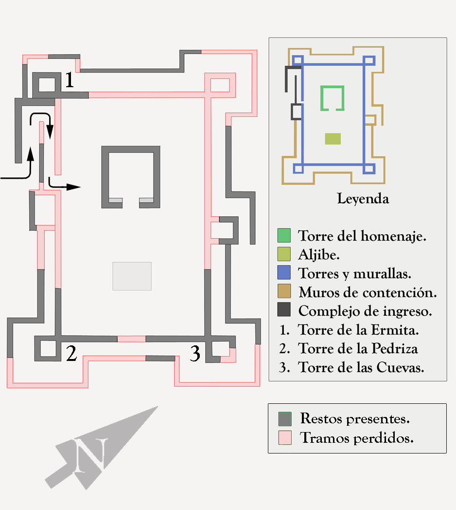 Plano del Castillo de Chera. Se indican los restos observables en la actualidad y una aproximación de los tramos perdidos para dar una idea de su estructura. Se acompaña de un diagrama explicativo de la función de cada elemento. Chera, provincia de Valencia, Comunidad Valenciana.